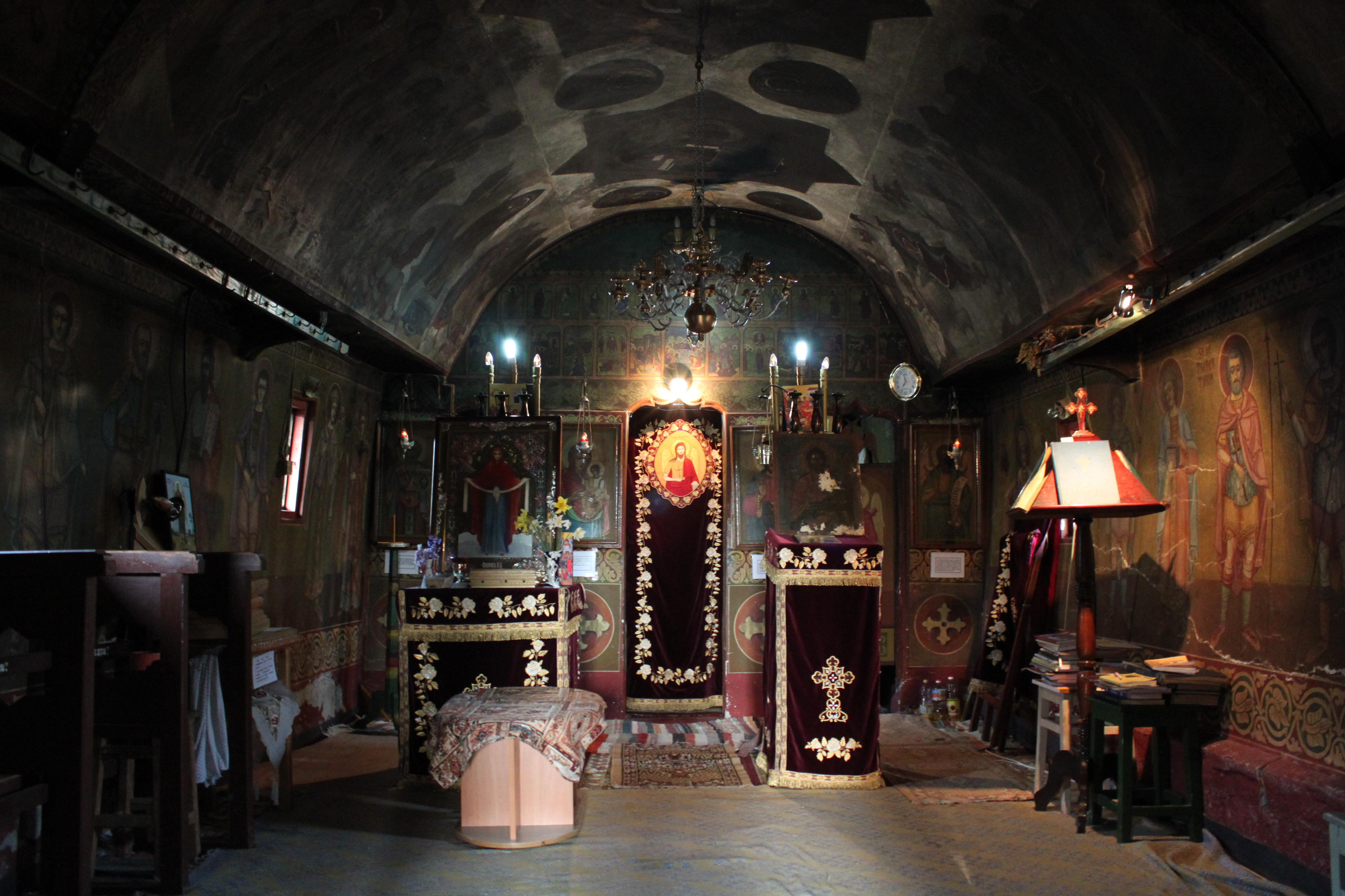 Biserica de lemn din Bărbălăteşti, judeţul Argeş.